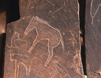 Gravure préhistorique du sud oranais (Algérie)